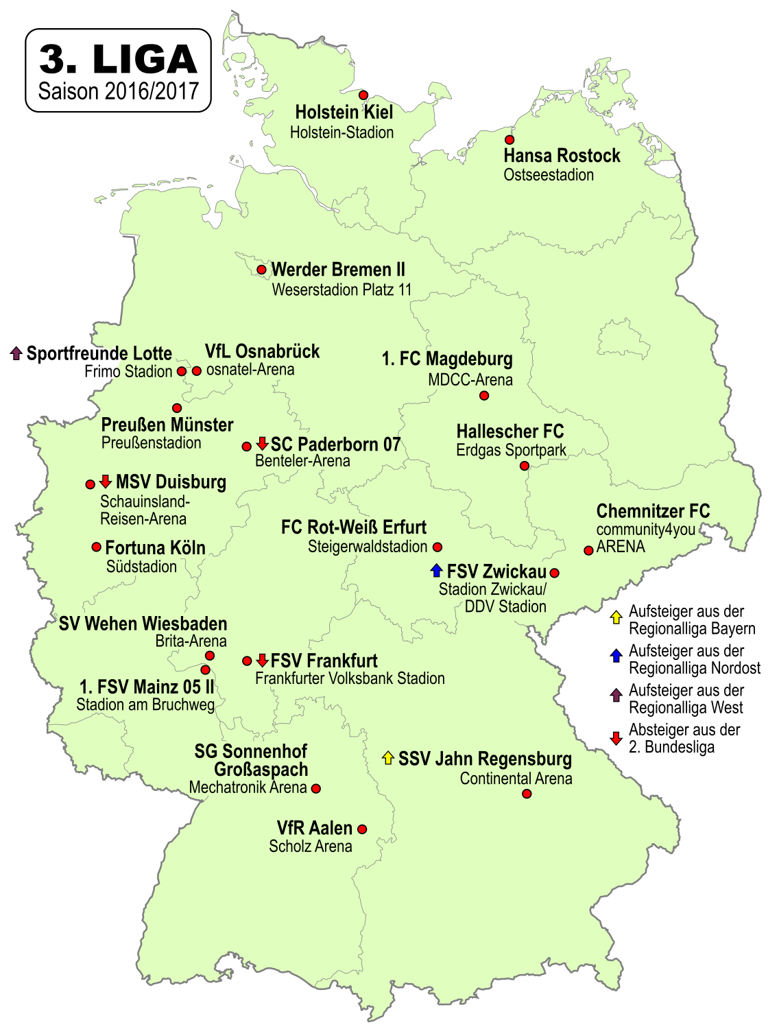 Karte der Vereine der 3. Fussball-Liga 2016/2017